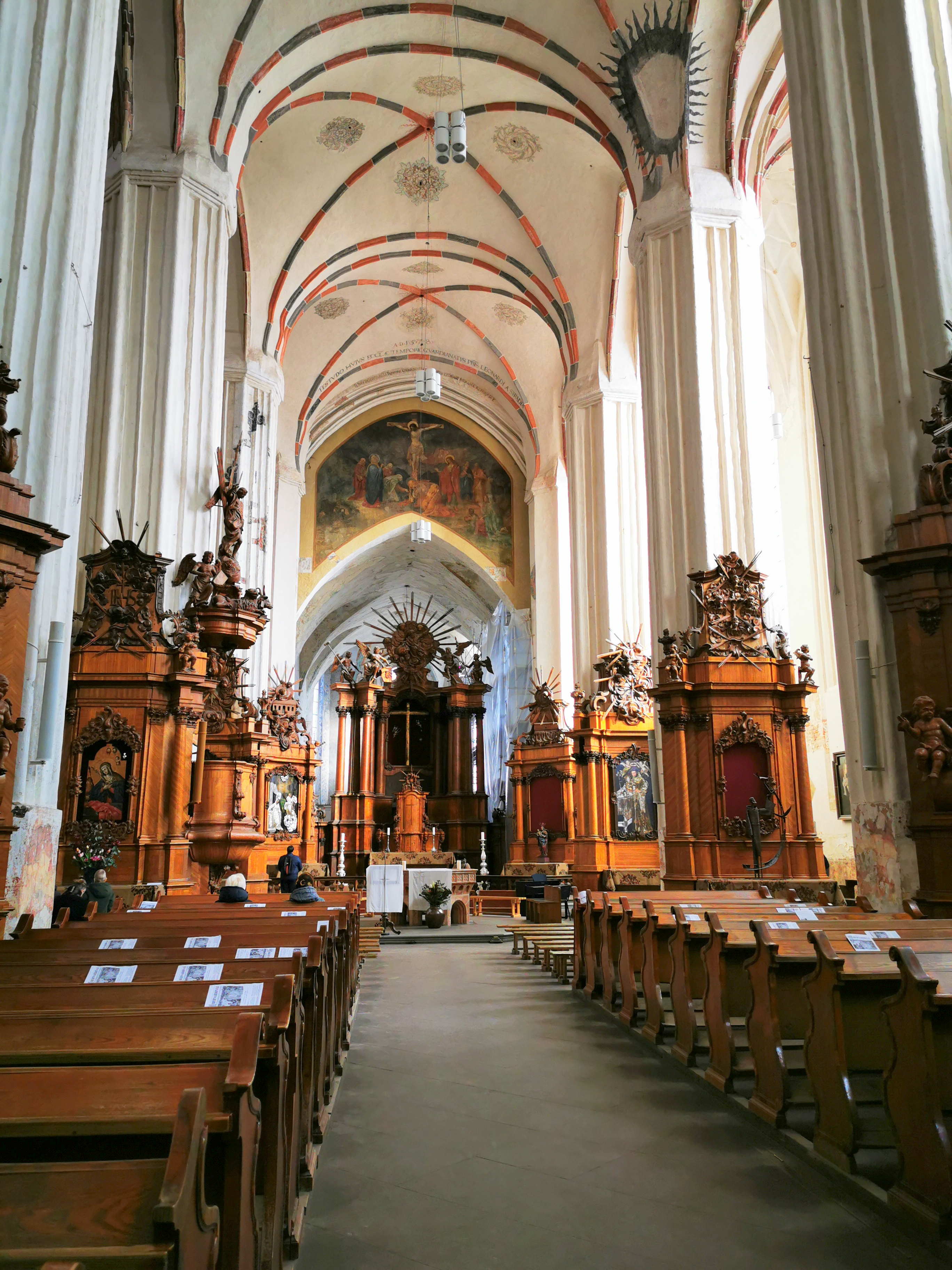 Bernardinų bažnyčios interjeras, priekyje didysis altorius